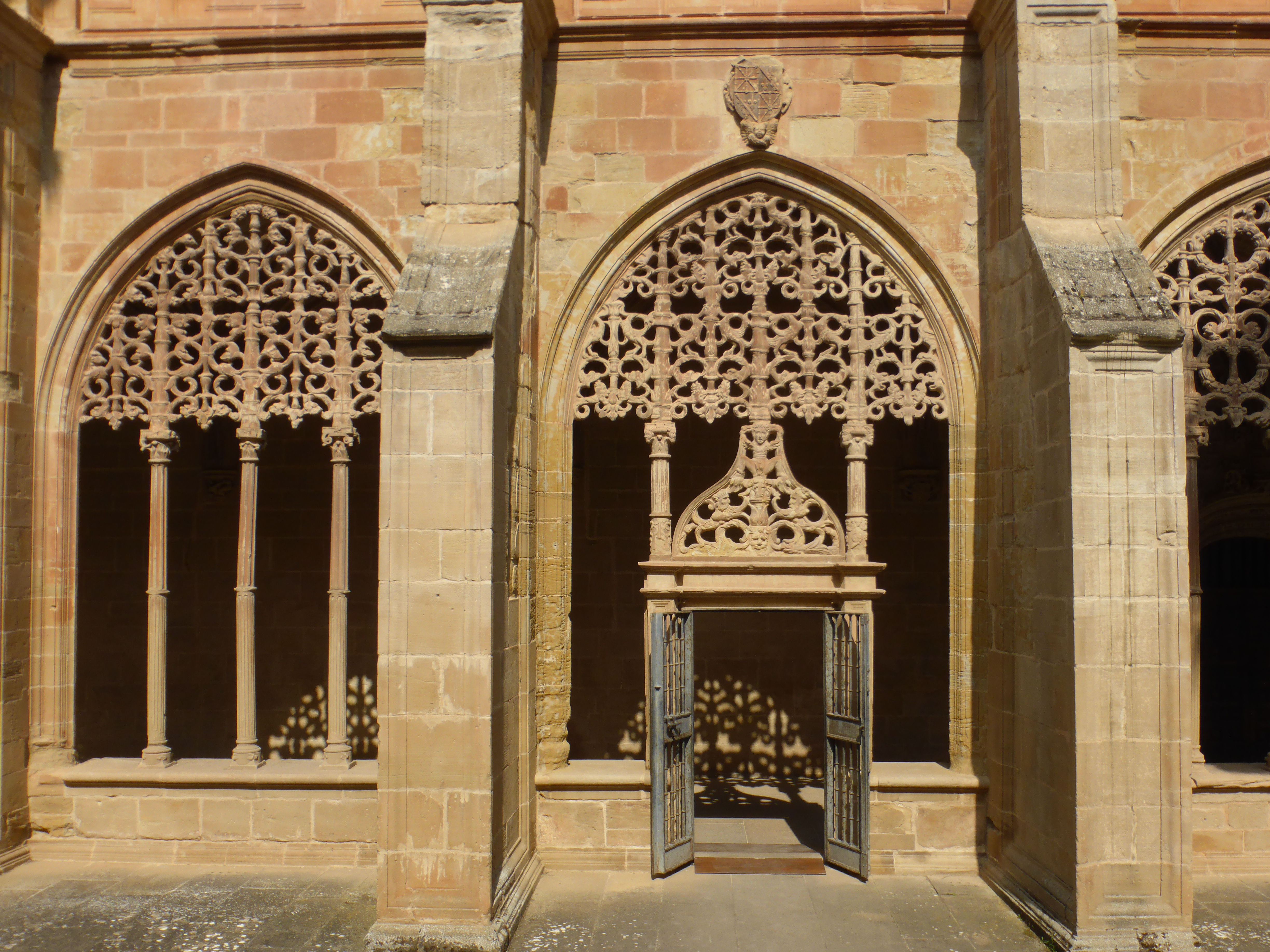 Estilo gótico plateresco (entre el gótico tardío y el Renacimiento).